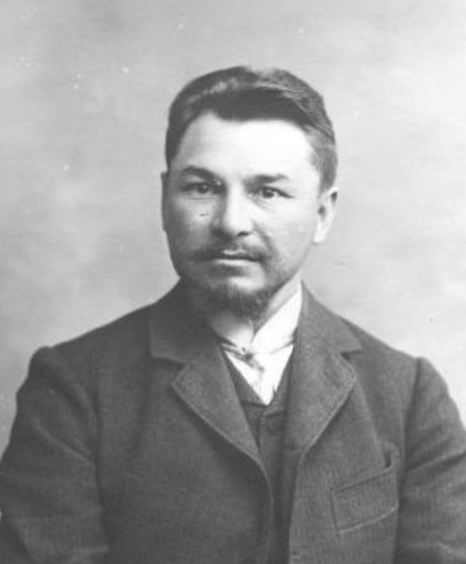 Депутат Первой Государственной думы от области войска Донского Федор Дмитриевич Крюков (1870-1920)